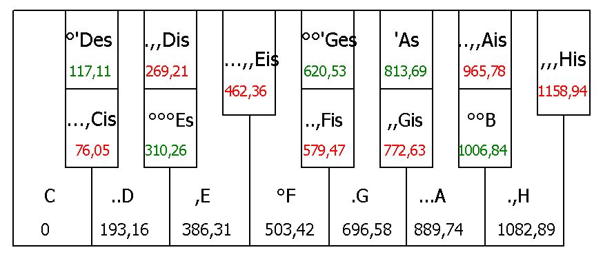 Die mitteltönige Stimmung für mehr Tonarten durch geteilte Tasten möglich gemacht. Berechnungen in Eulerscher Schreibweise mit ,x 'x: Ein Komma tiefer / höher und .x °x: 1/4-Komma tiefer / höher